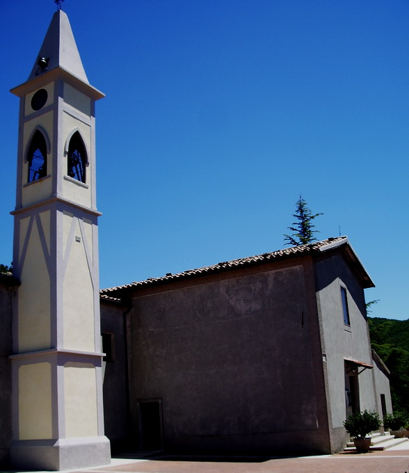 Chiesa di San Nicola a Selvena (GR), foto 13/07/2007